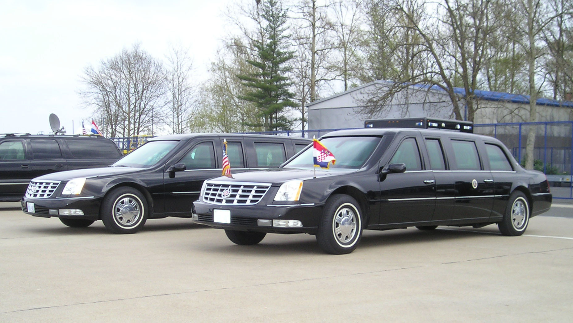 Busheve limuzine u Zagrebu 05/04/2008